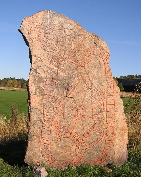 Sö109 Gredby Etuna